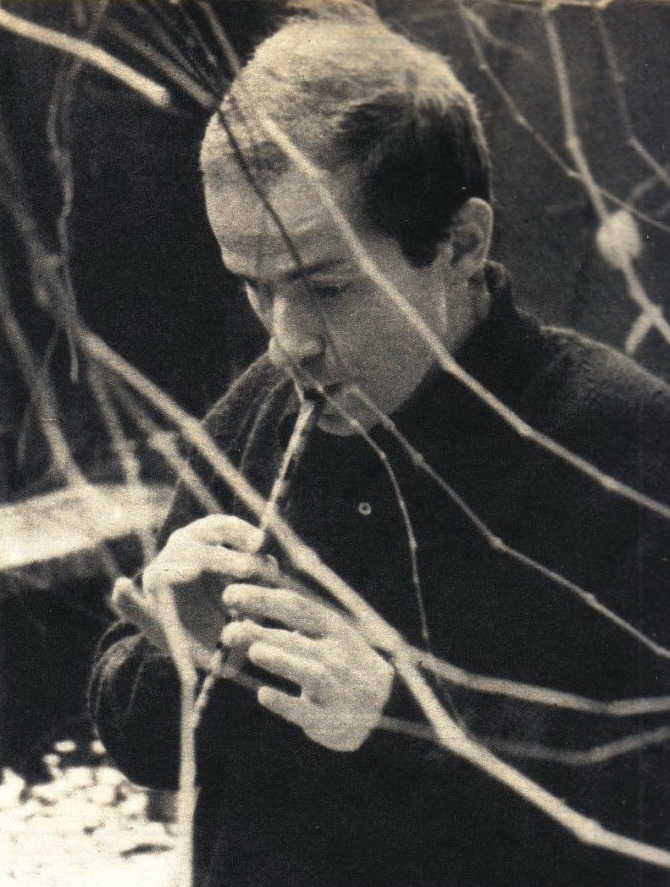 Italian singer Gino Paoli